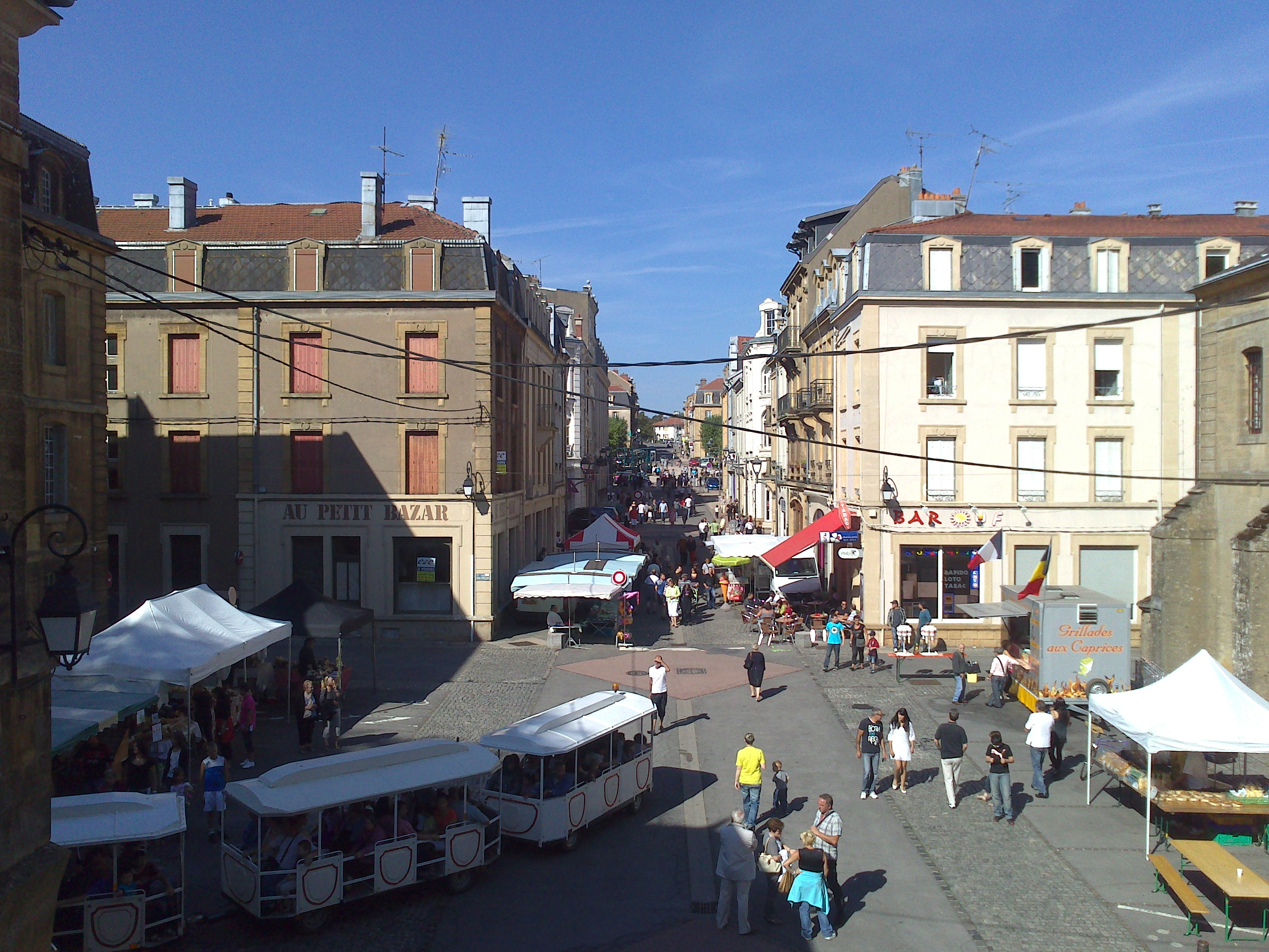 Rue Aristide Briand, à Longwy, entre la Place Darche et la Porte de France